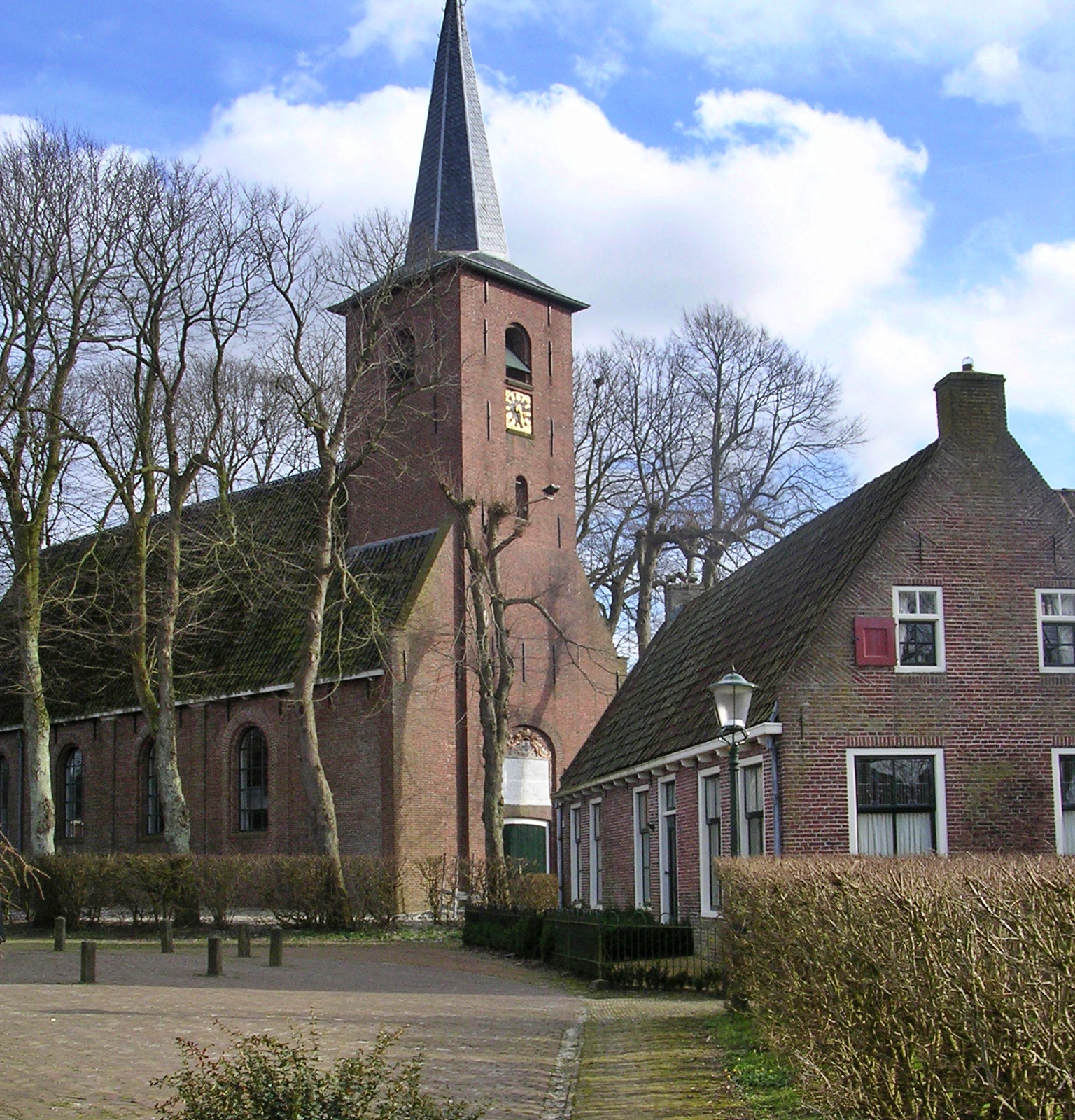 De Tsjerke fan Mitselwier, fan de westkant sjoen.